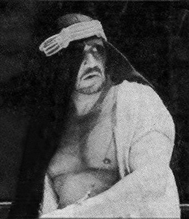 The Sheik en couverture du magazine de catch Body Press de 1972.